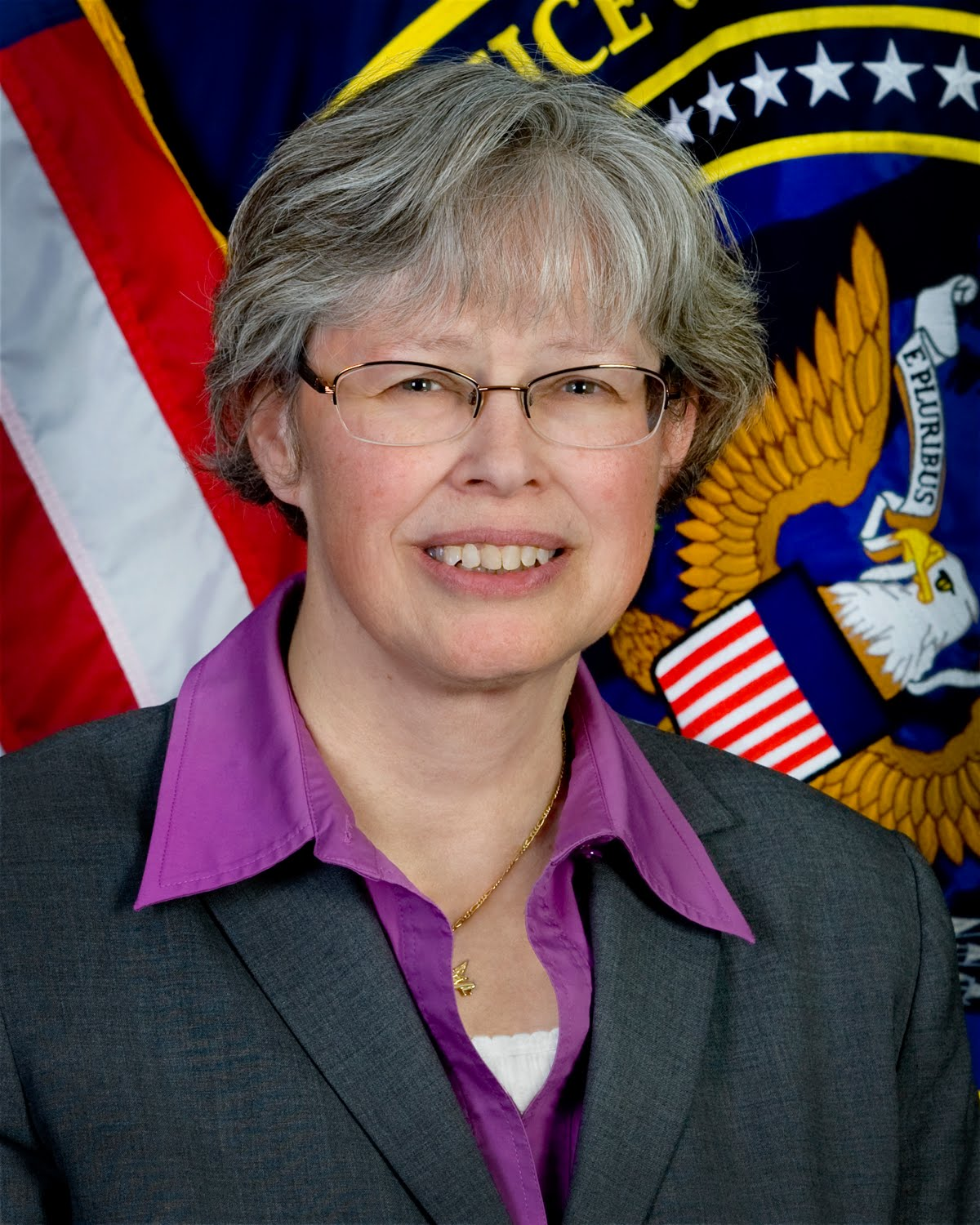 Stephanie O'Sullivan.